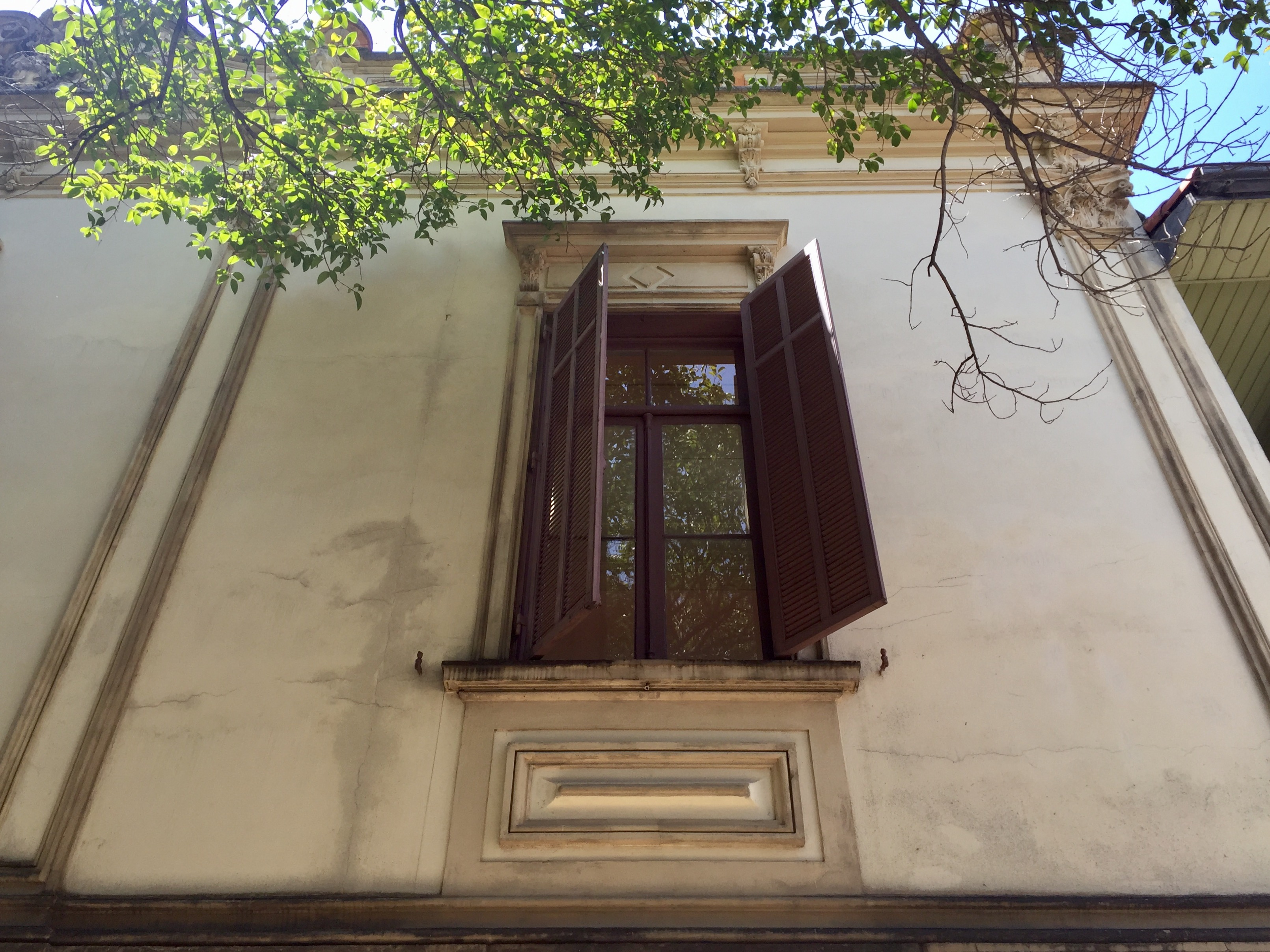 Janela na parte oeste da Casa de Dona Yayá, em São Paulo (SP), Brasil